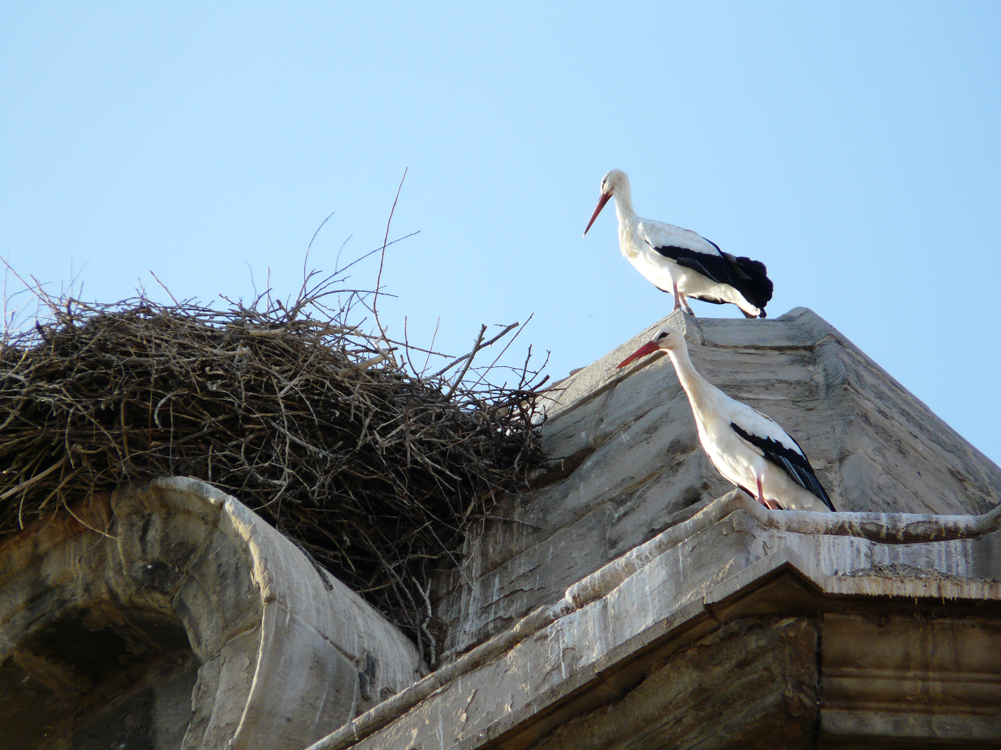 Seu Nova (Lleida) Object location41° 36′ 47.58″ N, 0° 37′ 22.81″ E